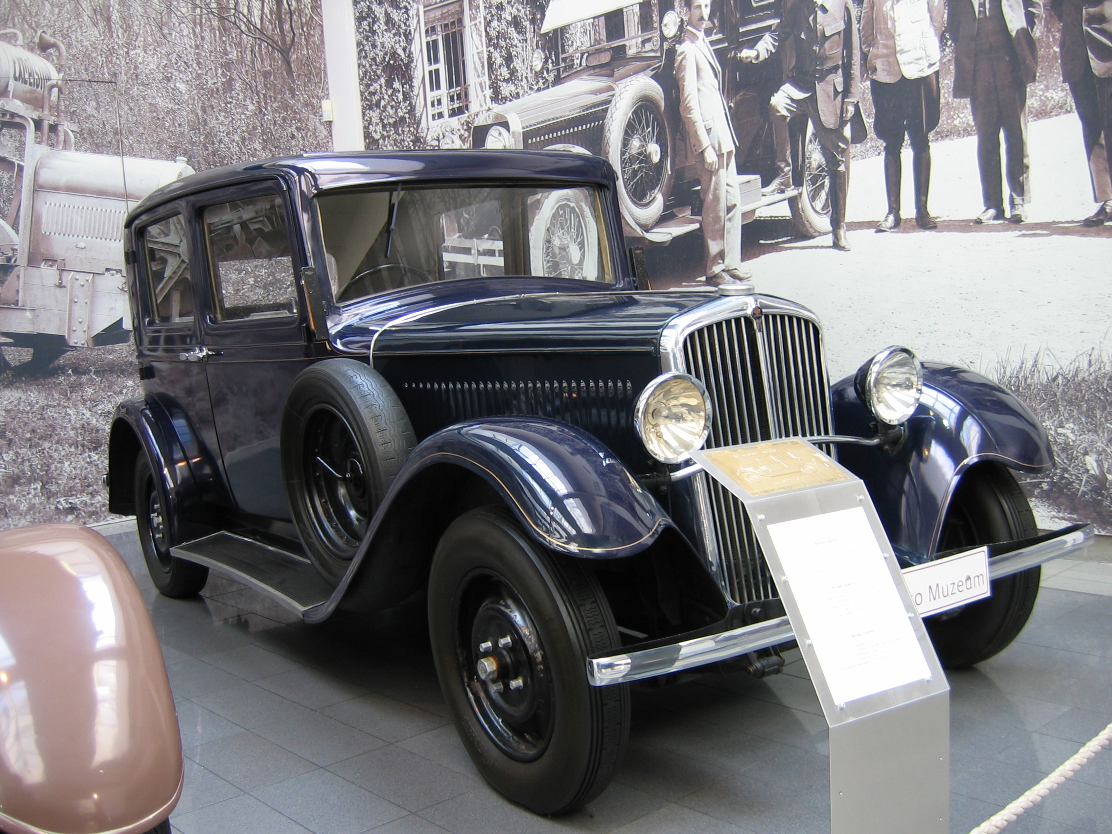 Škoda 633 - Škoda Auto Museum, Mlada Boleslav